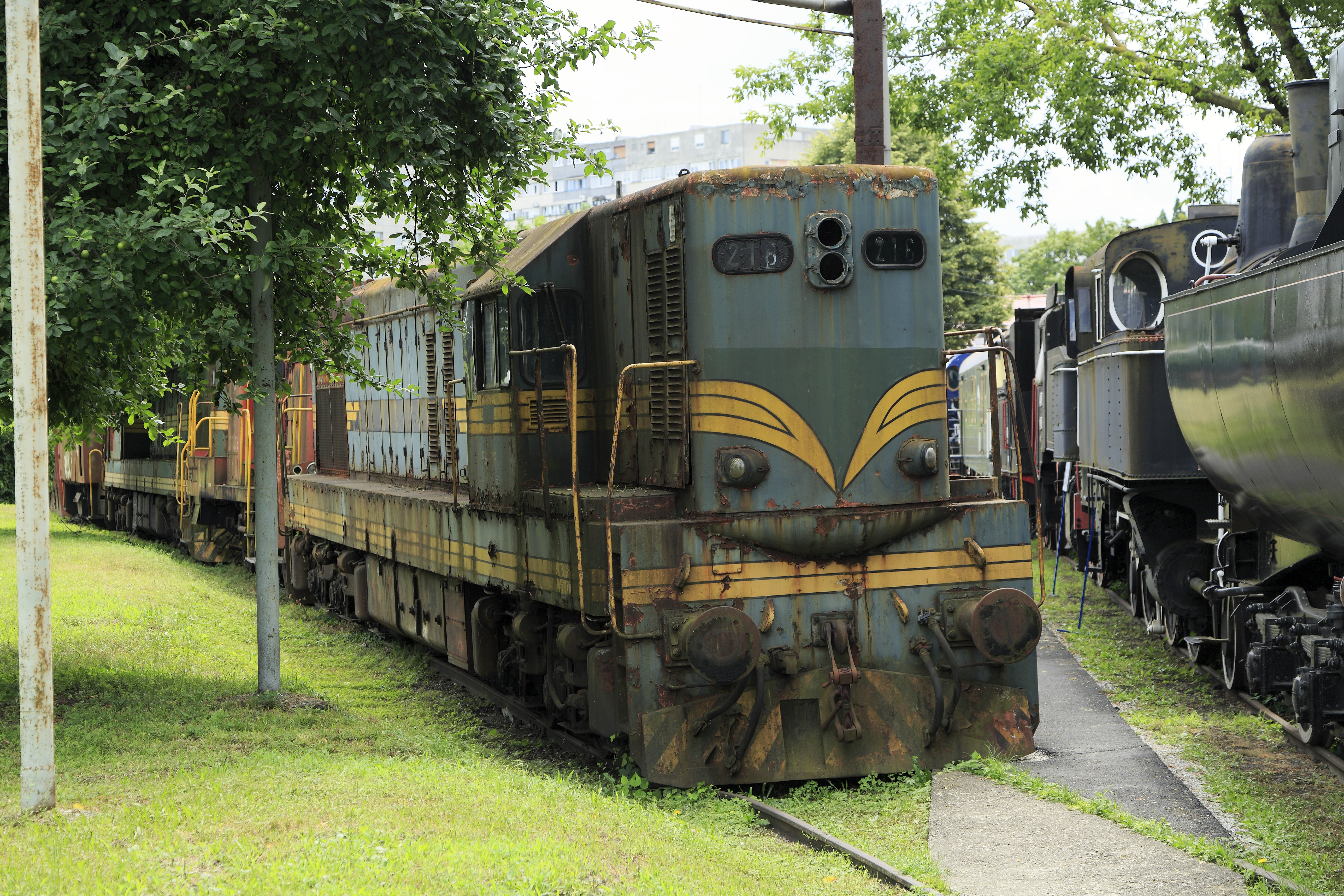 kommt noch